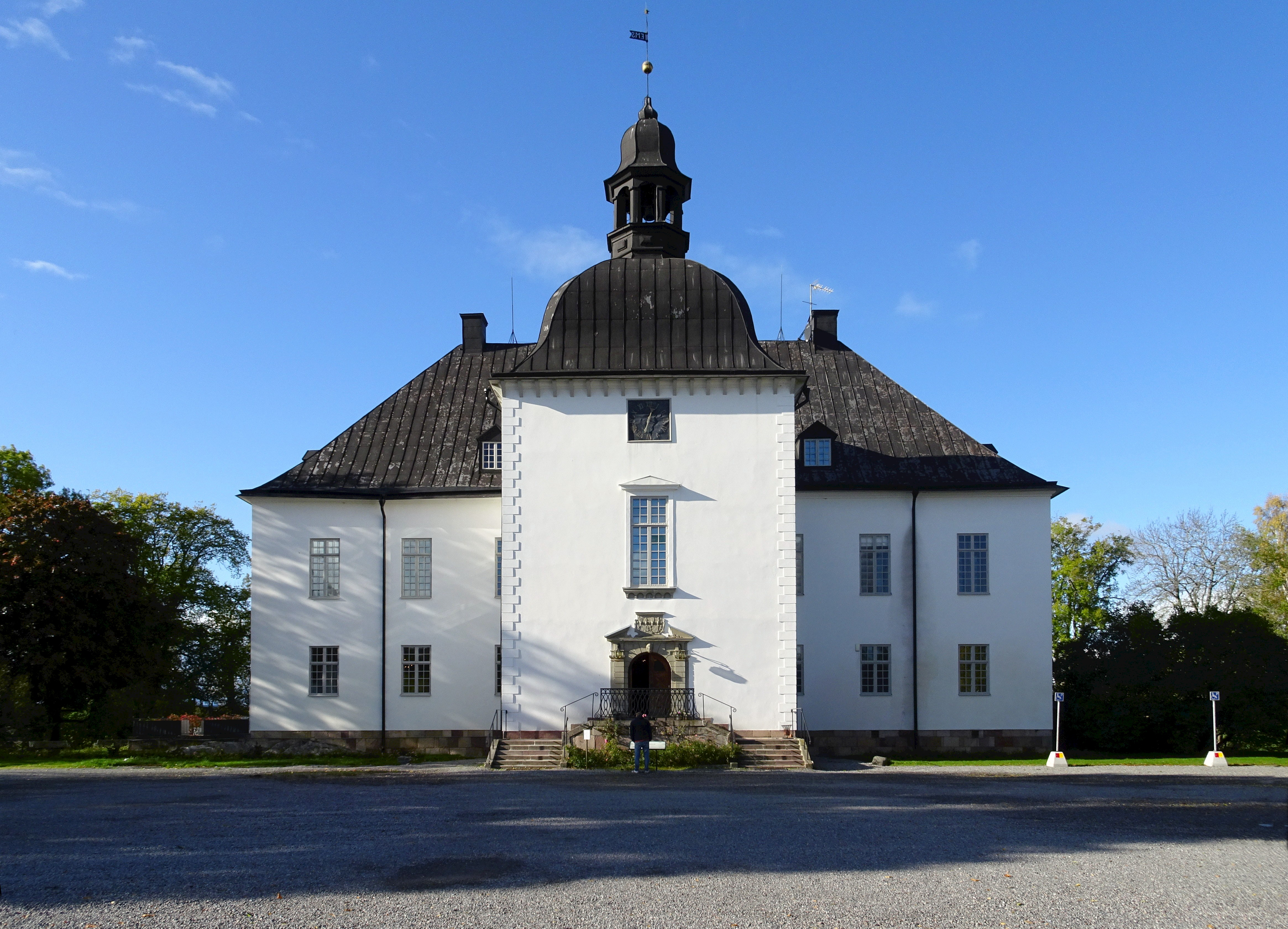 Årsta slott huvudfasad